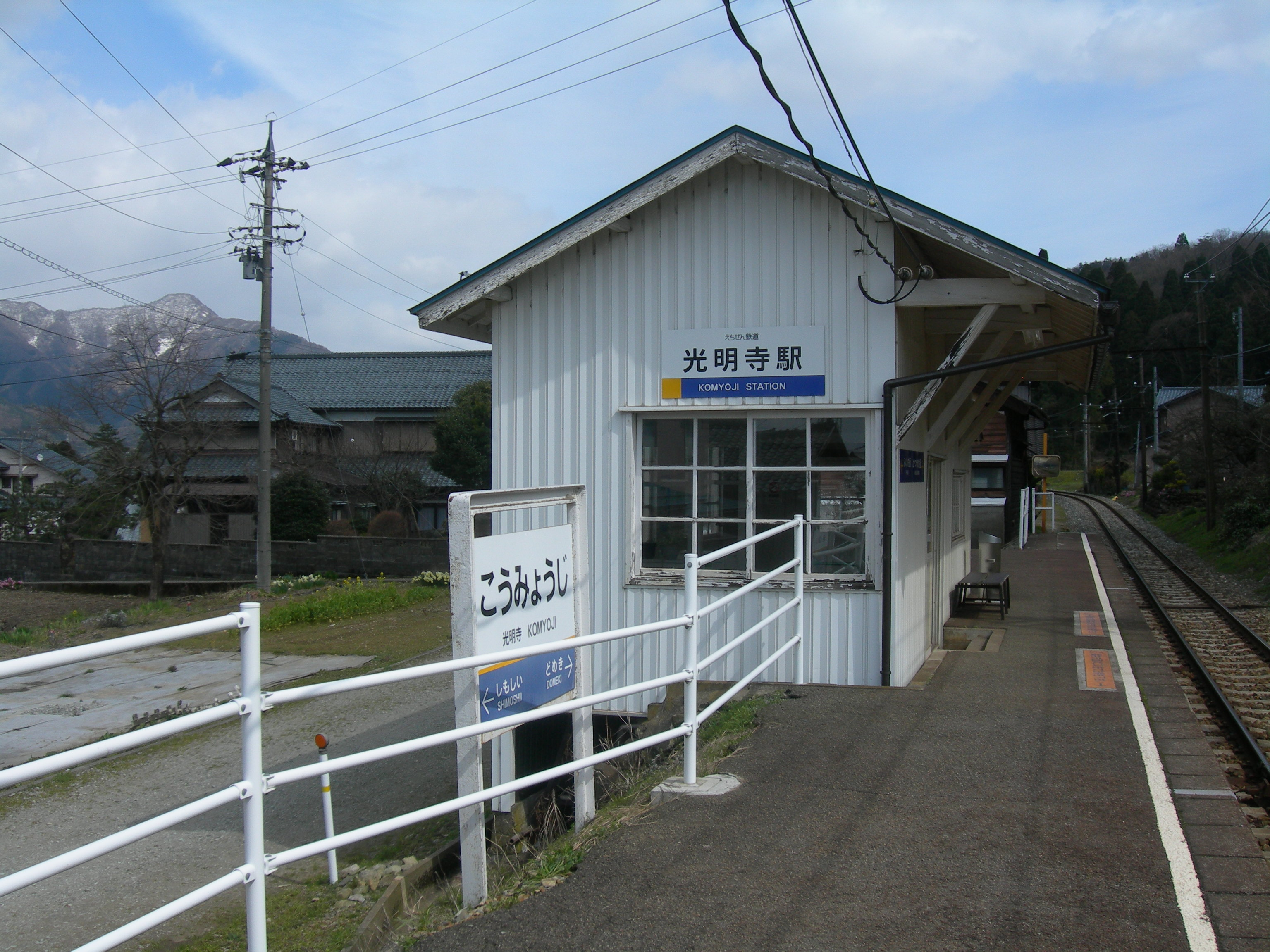 光明寺駅